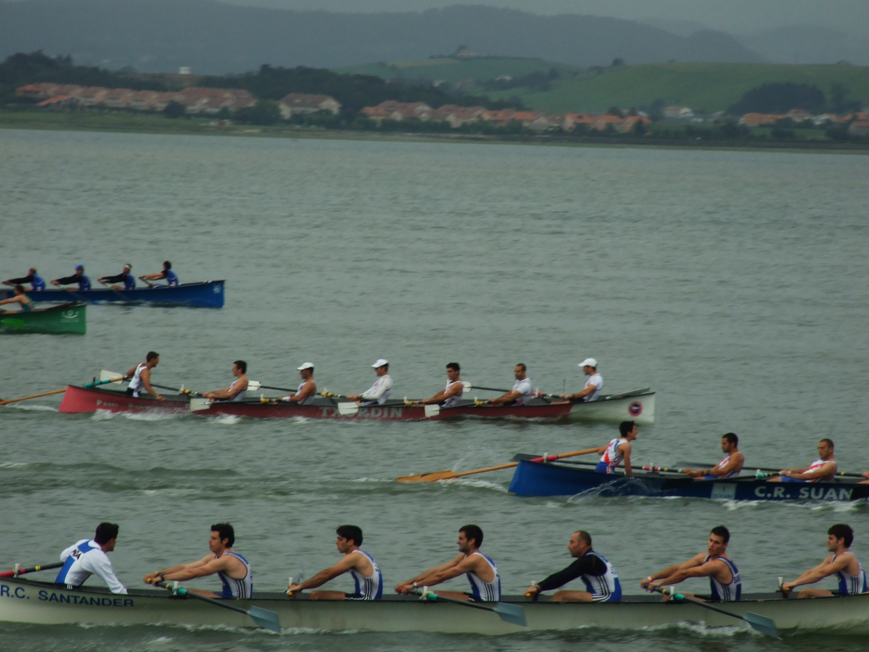 Primera tanda del Regional de Cantabria de Trainerillas 2007.